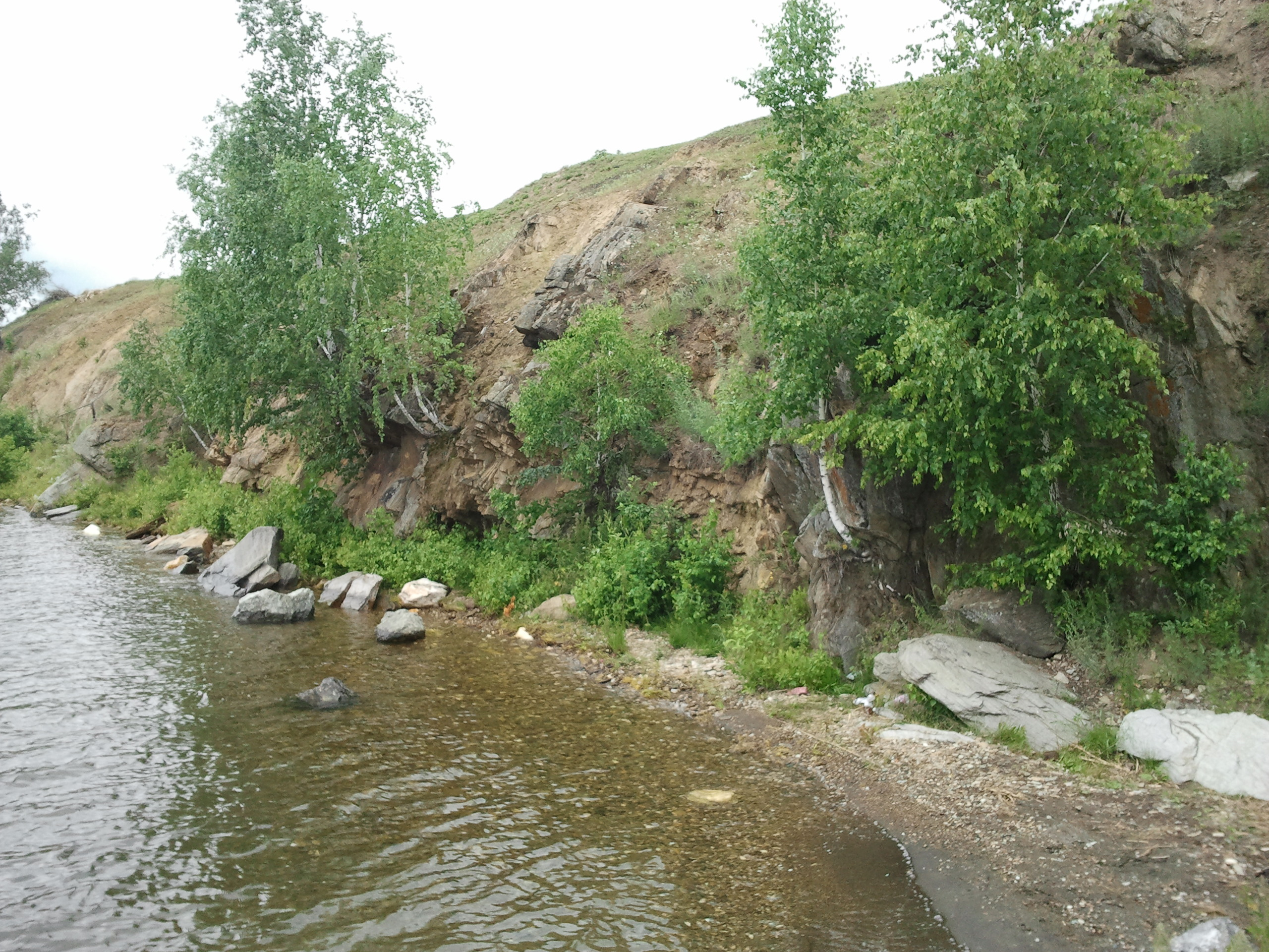 Берег озера Иткуль